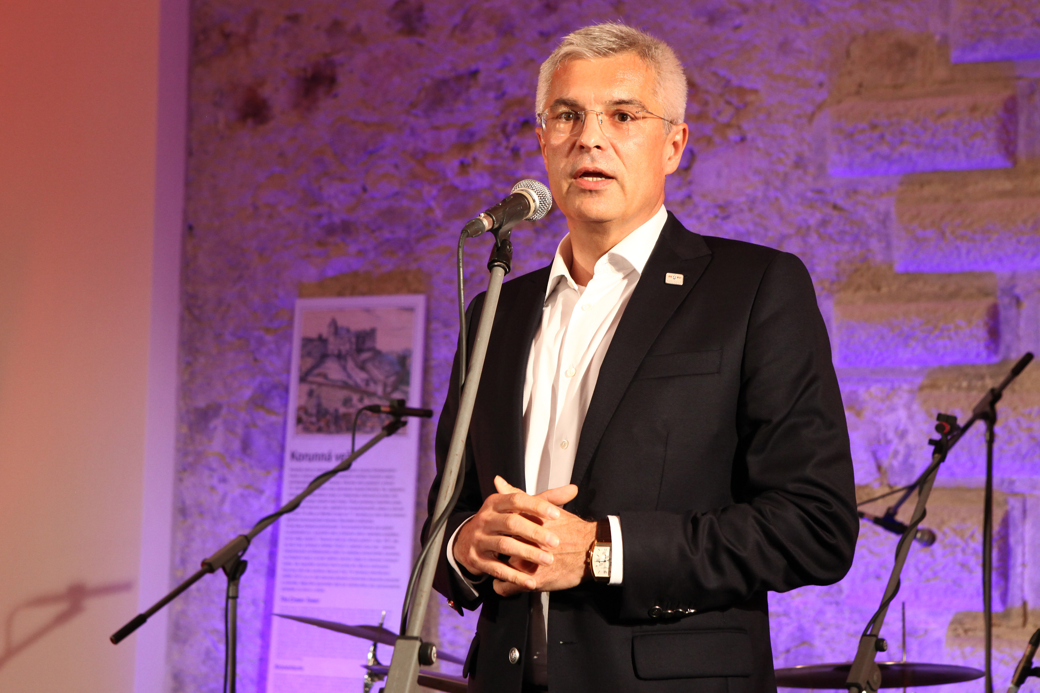 Photo: Andrej Klizan